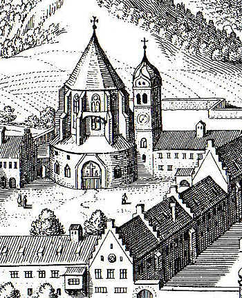 Kirche des Klosters Ettal(Ausschnitt aus einem Kupferstich, siehe File:Ethal (Merian).jpg)